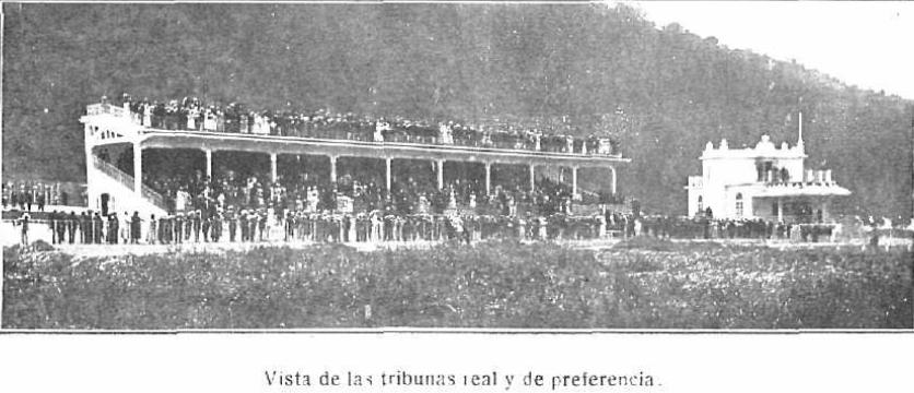 1916 hipodromoa tribunak (orokorra)